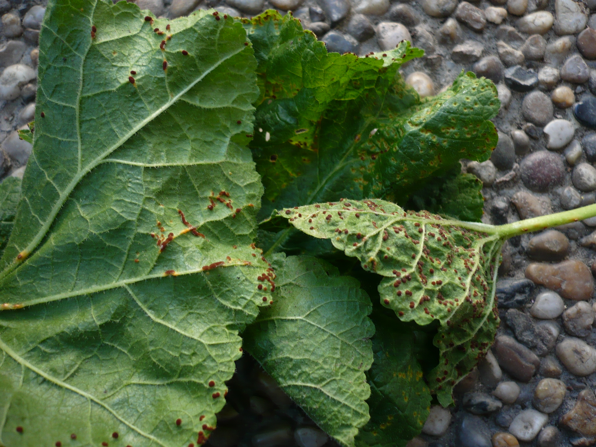 Puccinia malvacearum Image location: Wulkalände nahe Burg Forchtenstein, Forchtenstein, Bezirk Mattersburg, Burgenland, Austria [admin – Sat Aug 14 02:19:00 +0000 2010]: Changed location name from ‘Wulkalände nahe Burg Forchtenstein,Forchtenstein,Bezirk Mattersburg,Burgenland,Austria’ to ‘Wulkalände nahe Burg Forchtenstein, Forchtenstein, Bezirk Mattersburg, Burgenland, Austria’ Recognized by sight: causes damage to the plants For more information about this, see the observation page at Mushroom Observer.